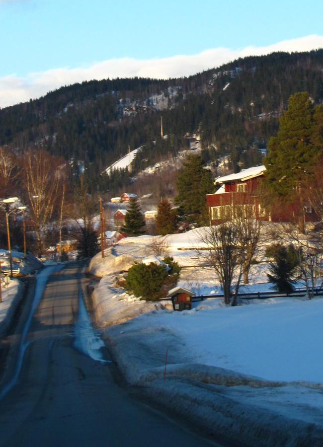 Skiflyvningsbakken set fra Heggenveien i Modum kommune, Buskerud fylke, Norge